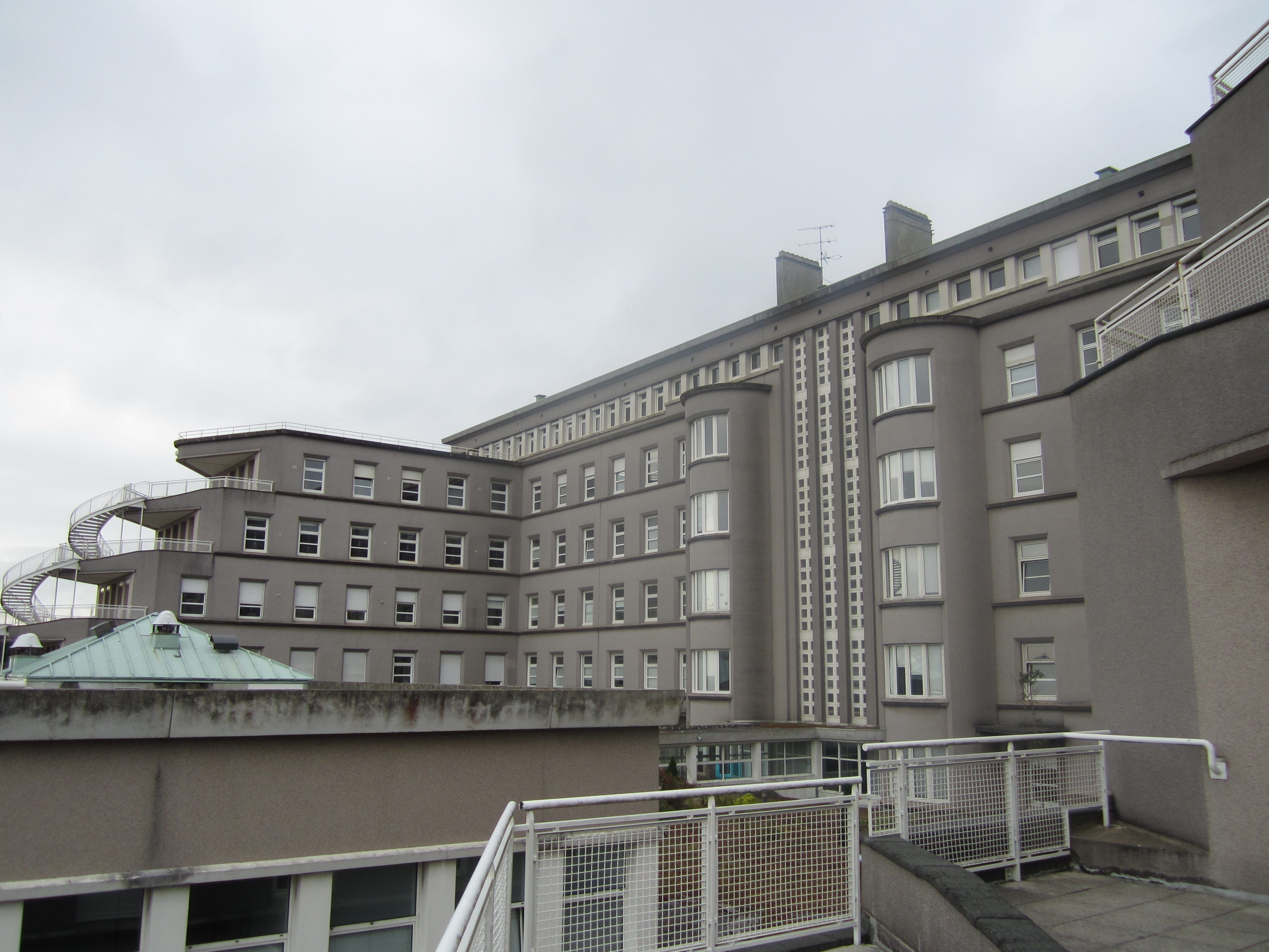 Hôpital Augustin-Morvan, Brest